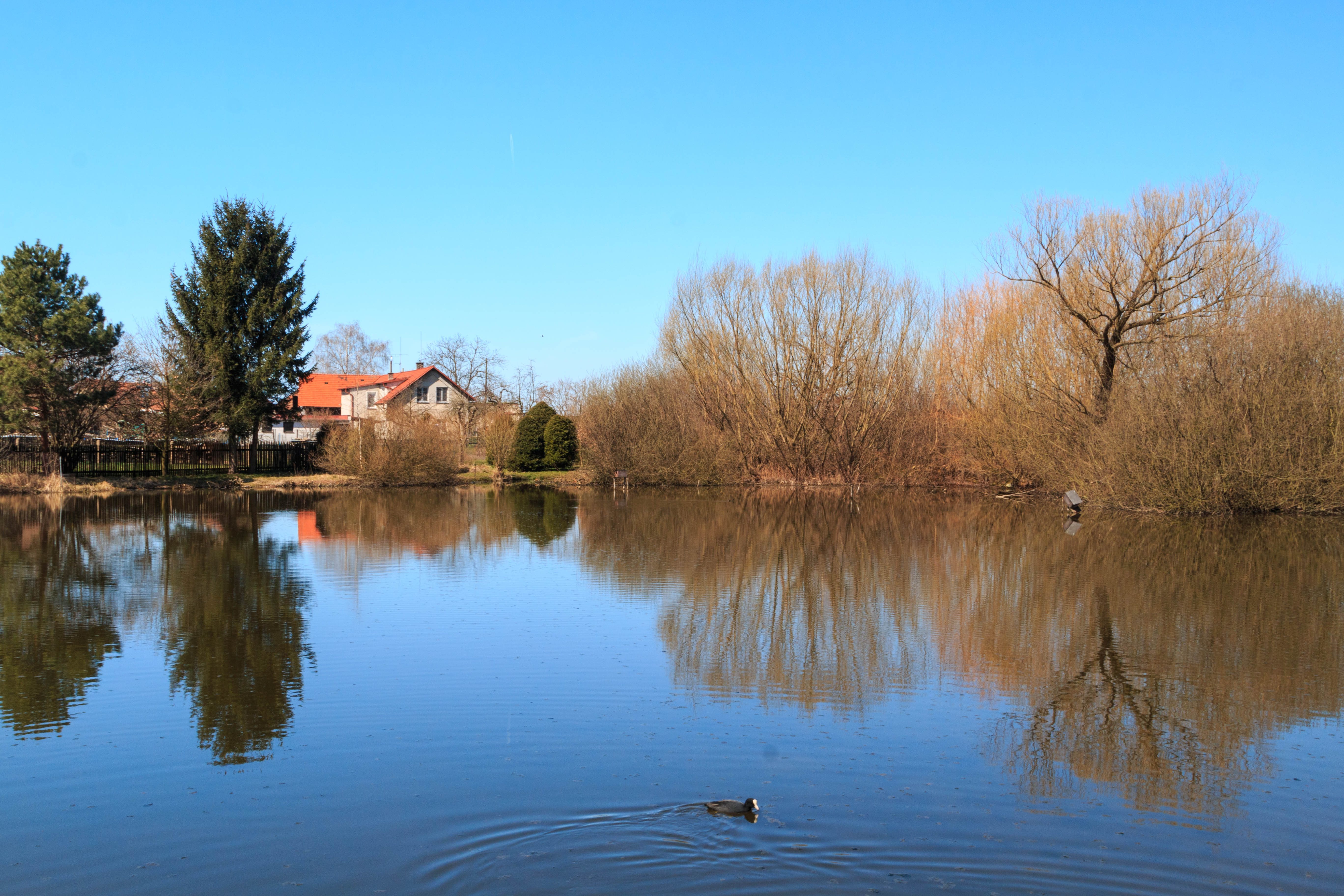 Podzvoniční rybník v Babicích Project: Vodstvo